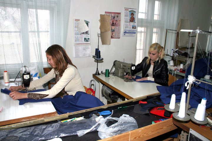 Конфекциски техничар